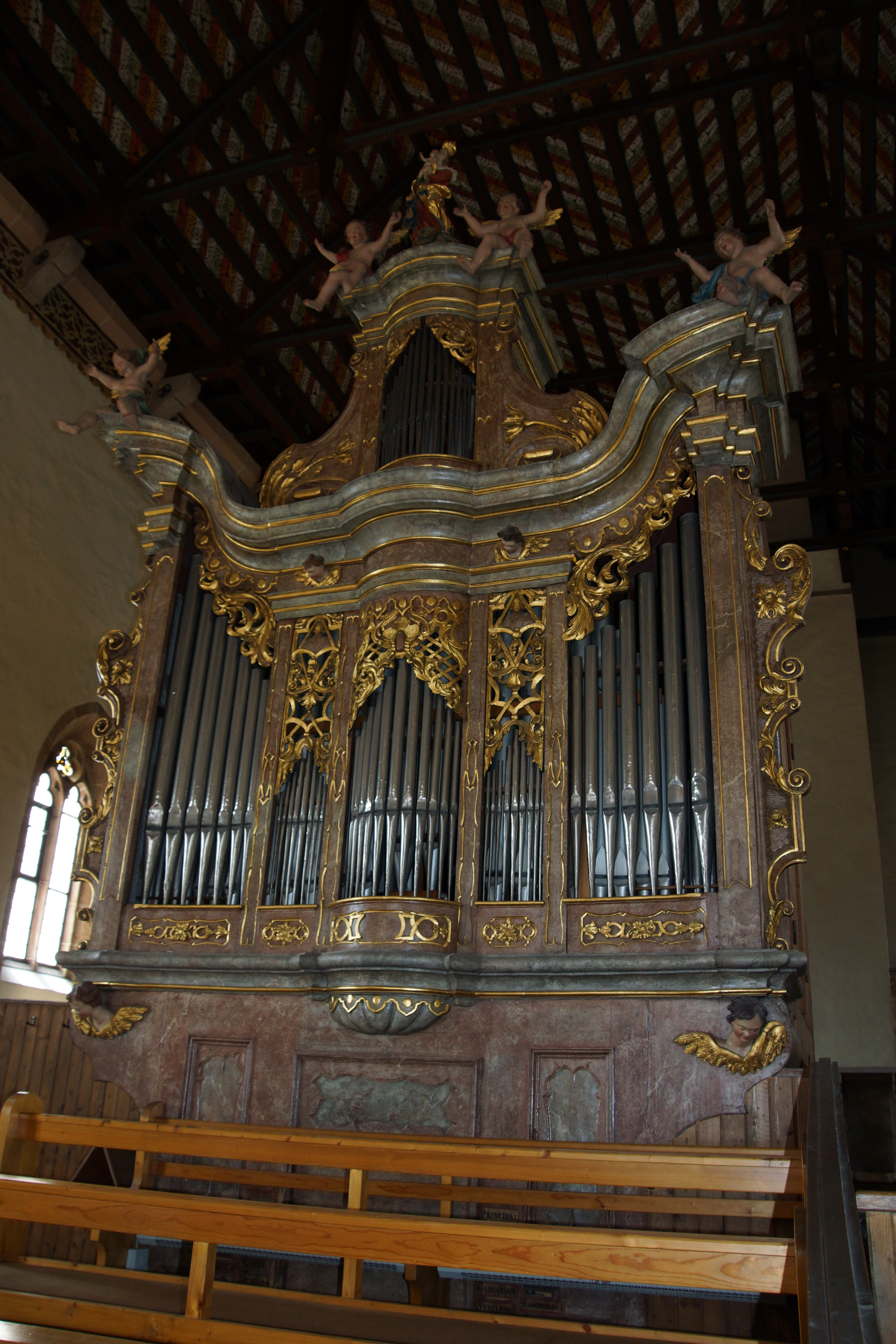 Kloster Seligenporten (Kreis Neumarkt in der Oberpfalz)